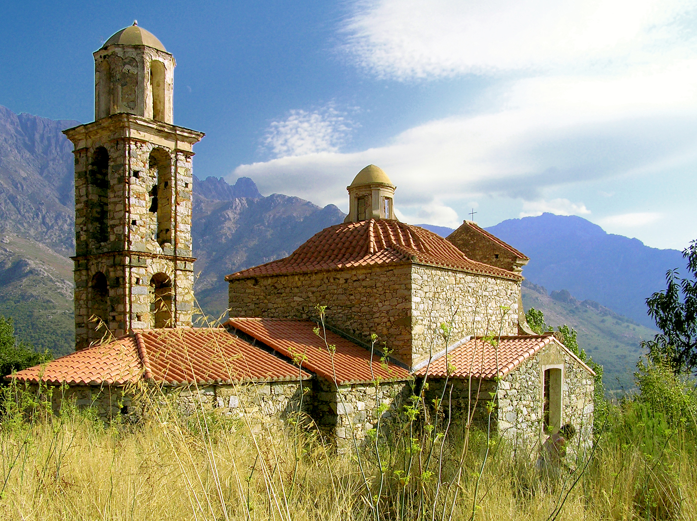 Montegrosso, Balagne (Corse) - L'église San Vitu à Lunghignano